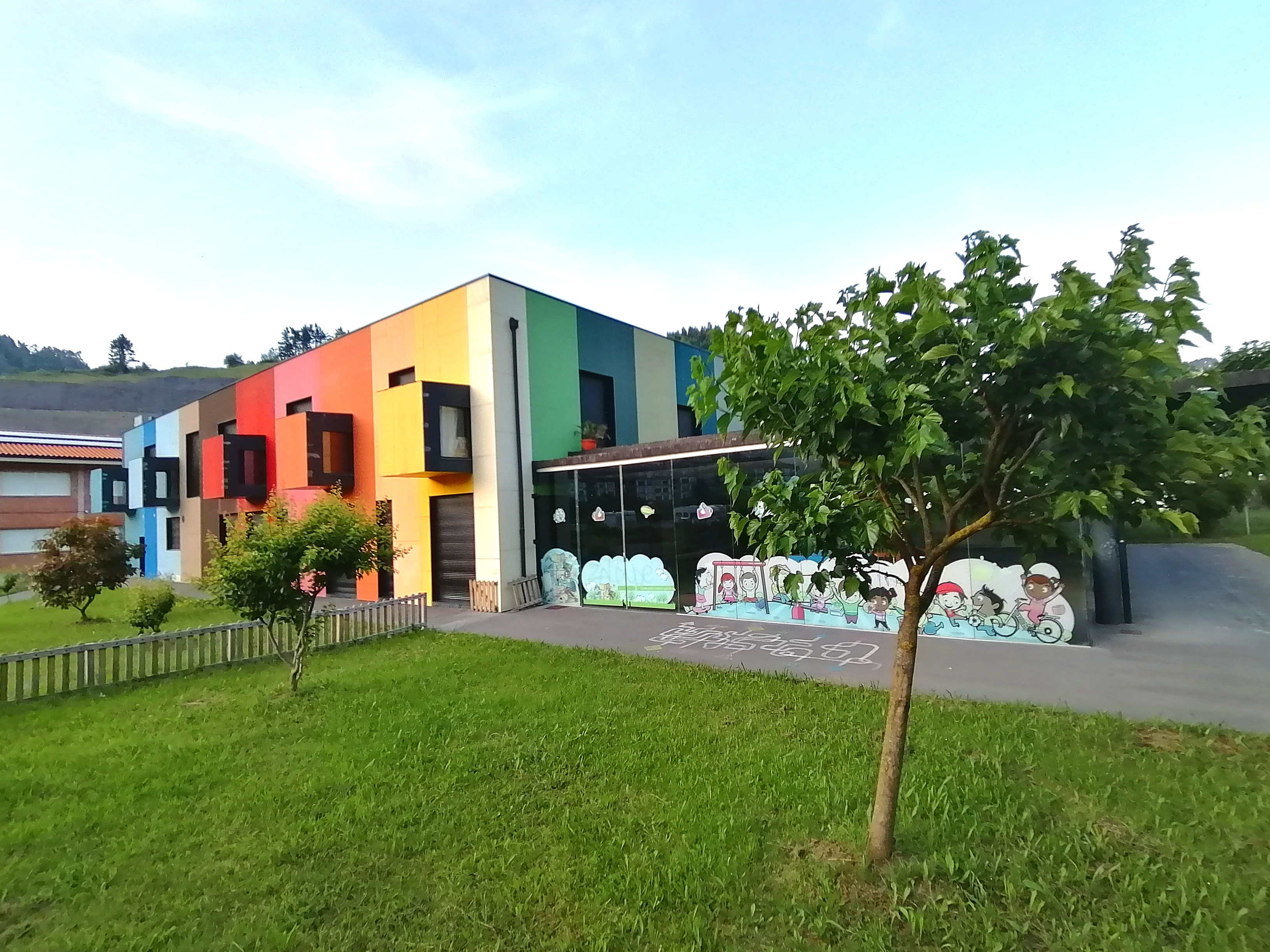 Ondarroako Zaldupe eskola